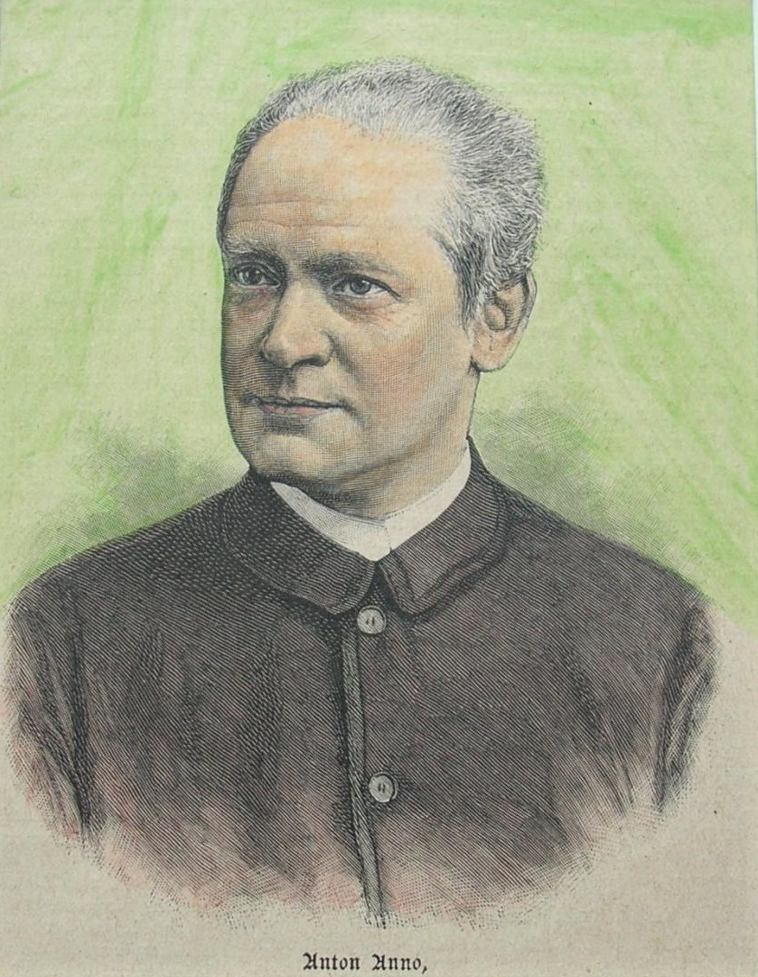 Anton Anno, Direktor des Königlichen Schauspielhauses in Berlin, teilkolorierter Holzstich, ca. 12 x 10 cm